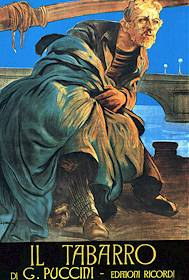 Poster de la ópera Il Tabarro de Puccini (G. Ricordi & Co.)